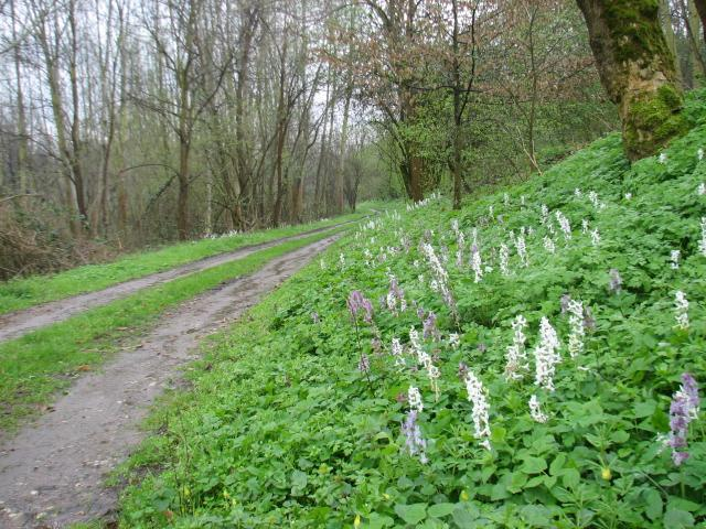 SIC Boschi del Vignolo, ZPS Boschi del Ticino, Italy, Garlasco, Parco Lombardo della Valle del Ticino